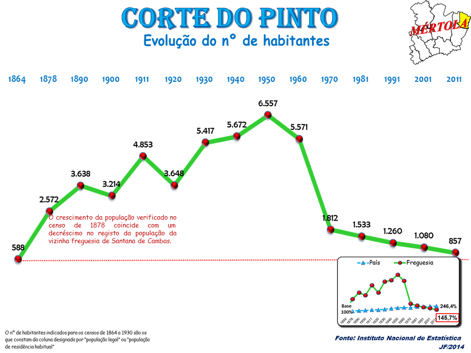 Evolução da População 1864 / 2011